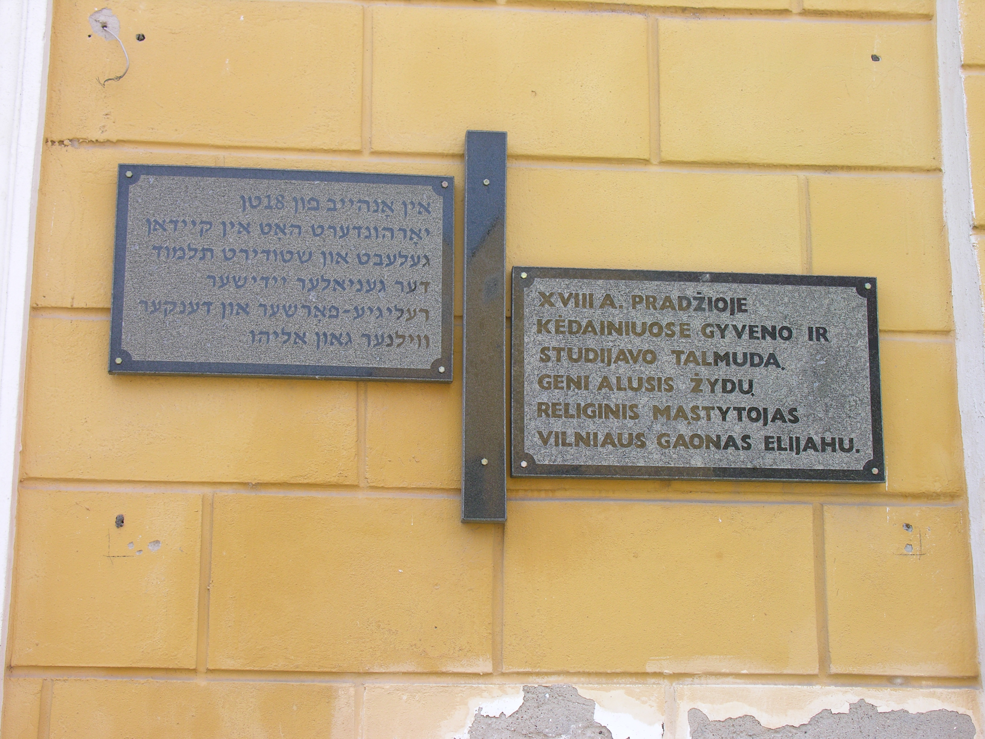 Tablica pamiątkowa na Synagodze, ul. Smilgos